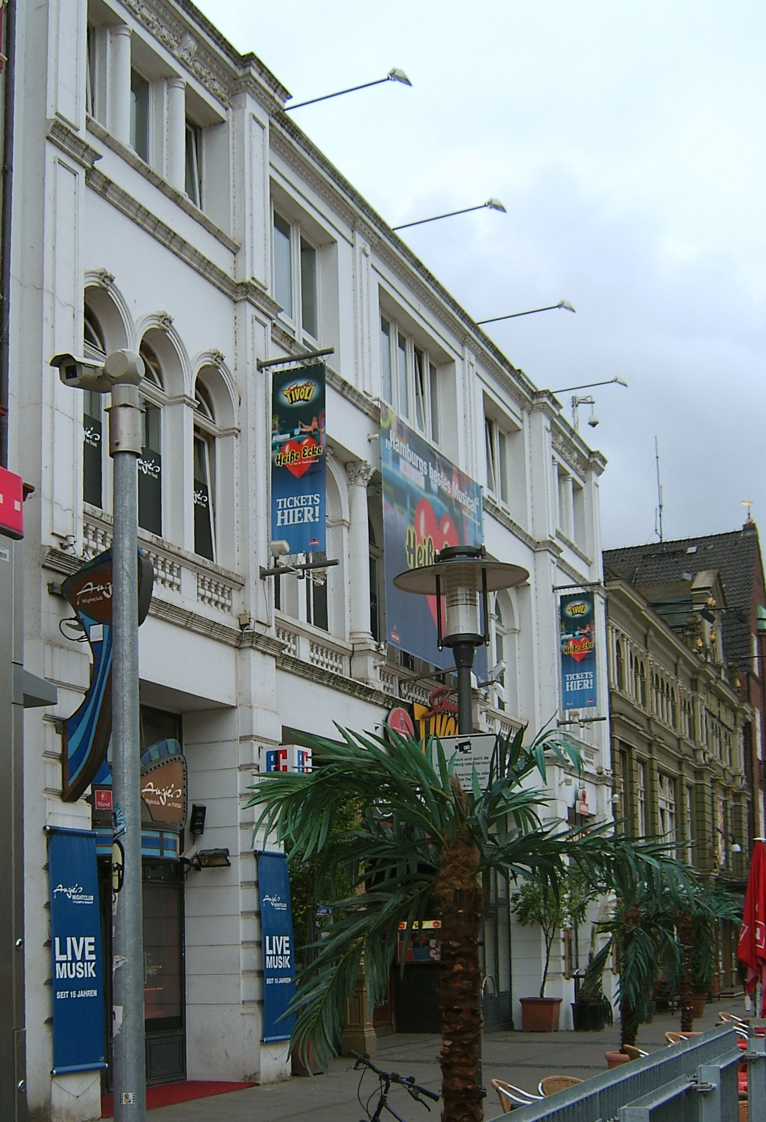 Das „Schmidts Tivoli“ am Spielbudenplatz auf St. PauliThis is a photograph of an architectural monument.